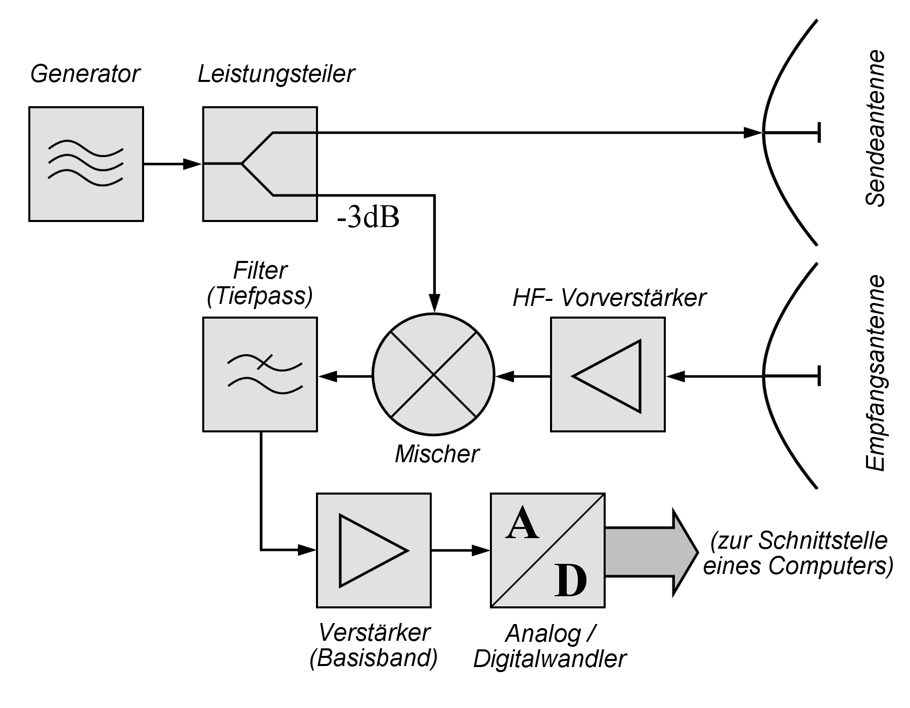 Blockschaltbild eines einfachen Dauserstrichradarmoduls